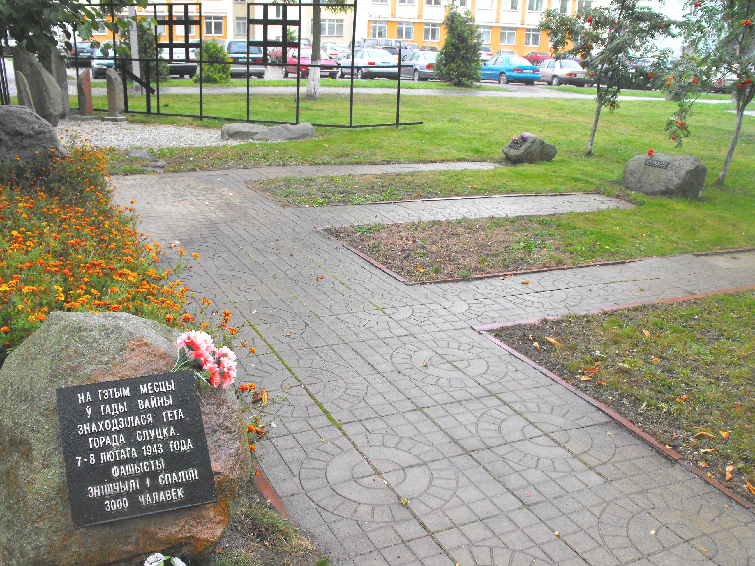 Мемориальный комплекс в центре Слуцка на улице Копыльской в память убитых евреев - узников Слуцкого гетто. Возведён в 2007 году. Автор проекта - Леонид Менделевич Левин.